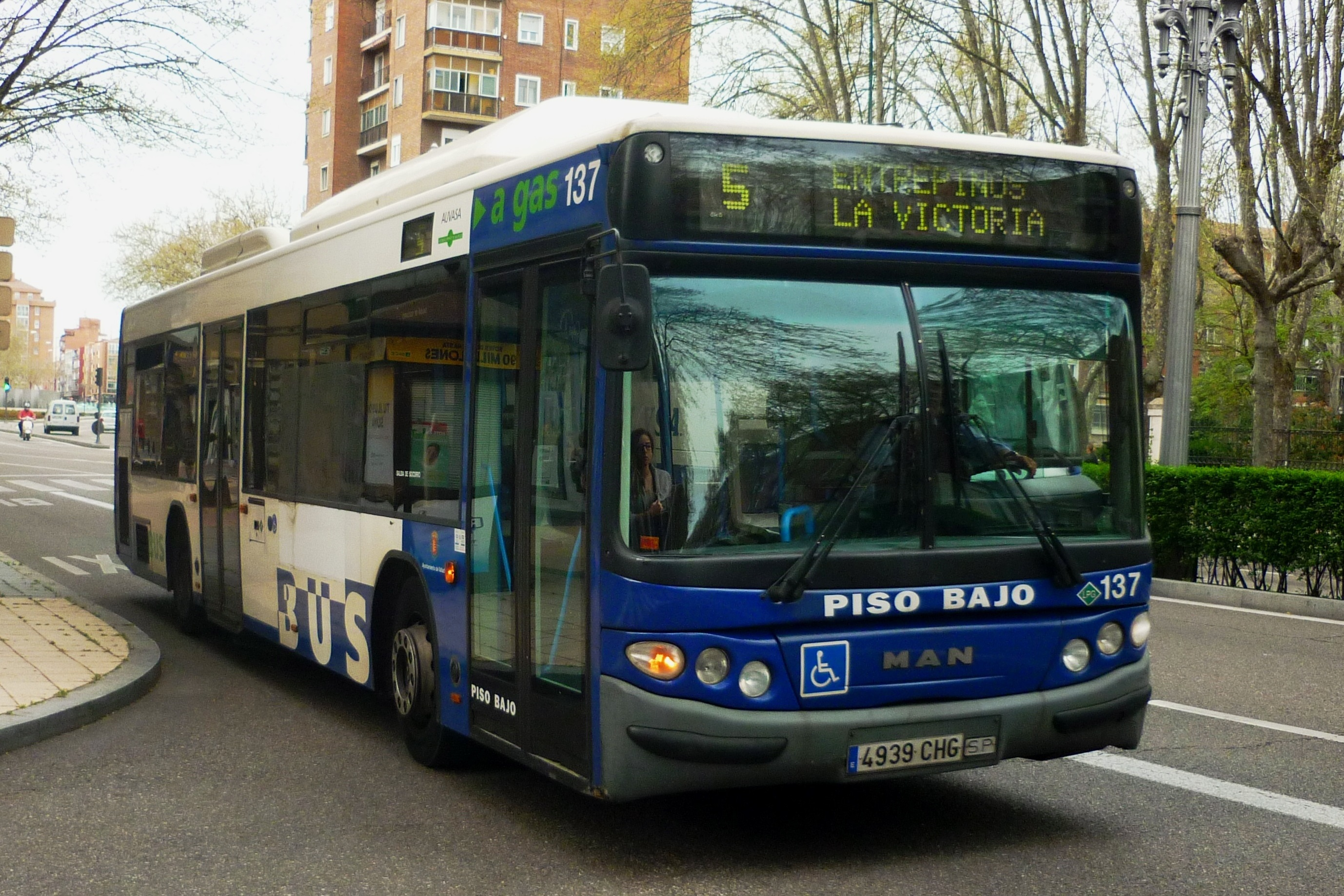 137_Auvasa